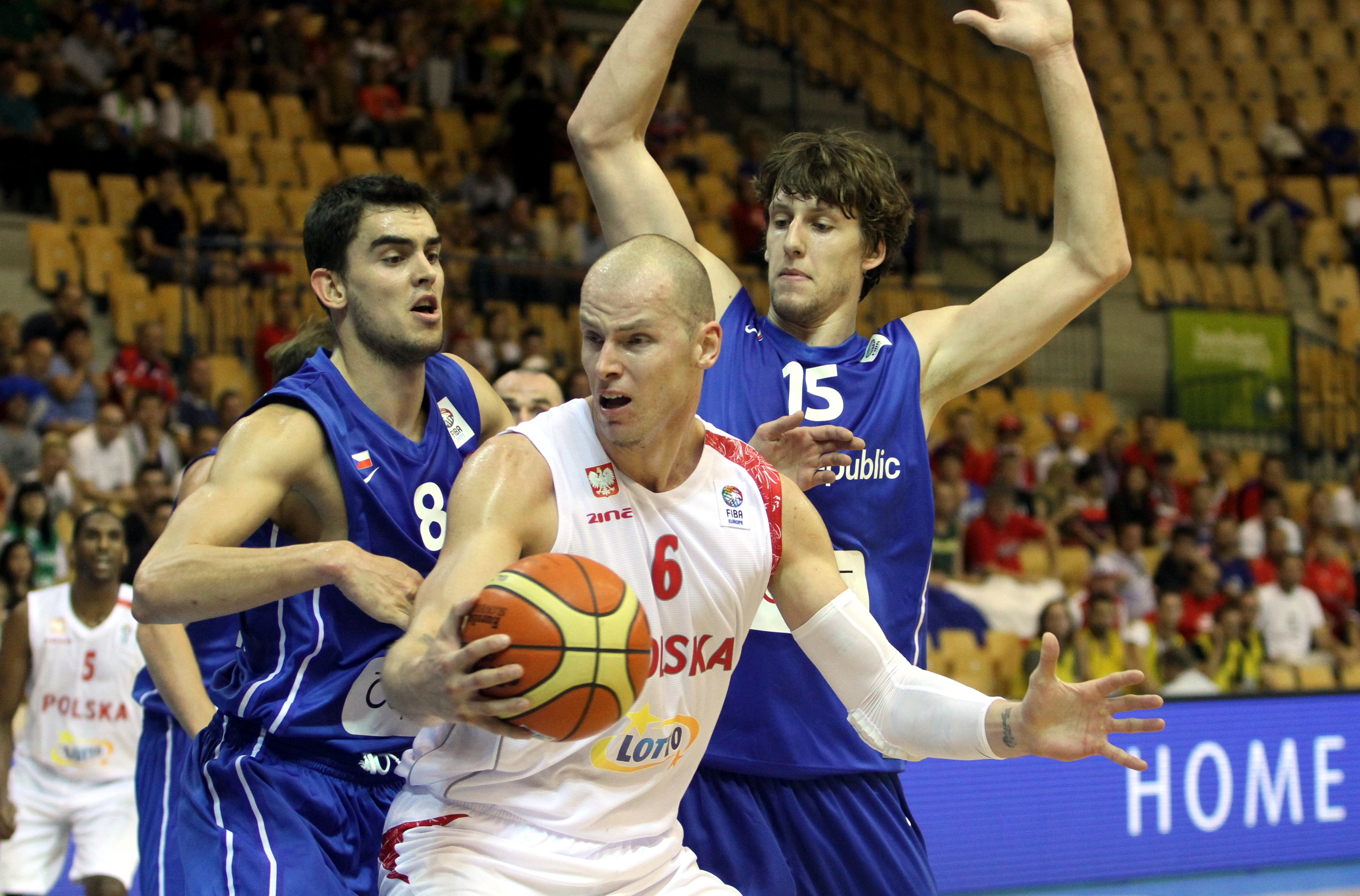 Reprezentacja Polski koszykarzy z 2013 roku. Maciej Lampe